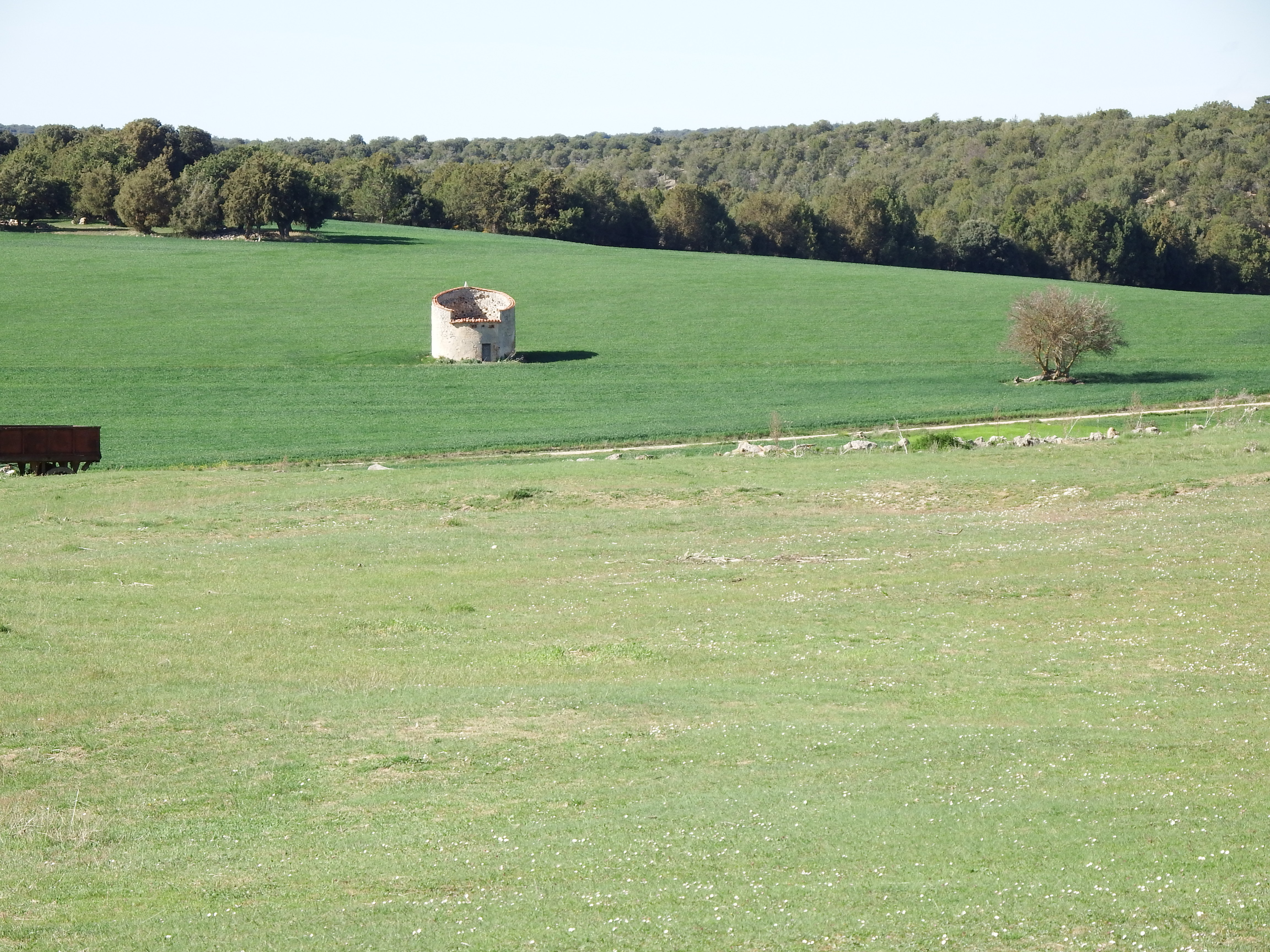 Palomares en Cilleruelo de Arriba